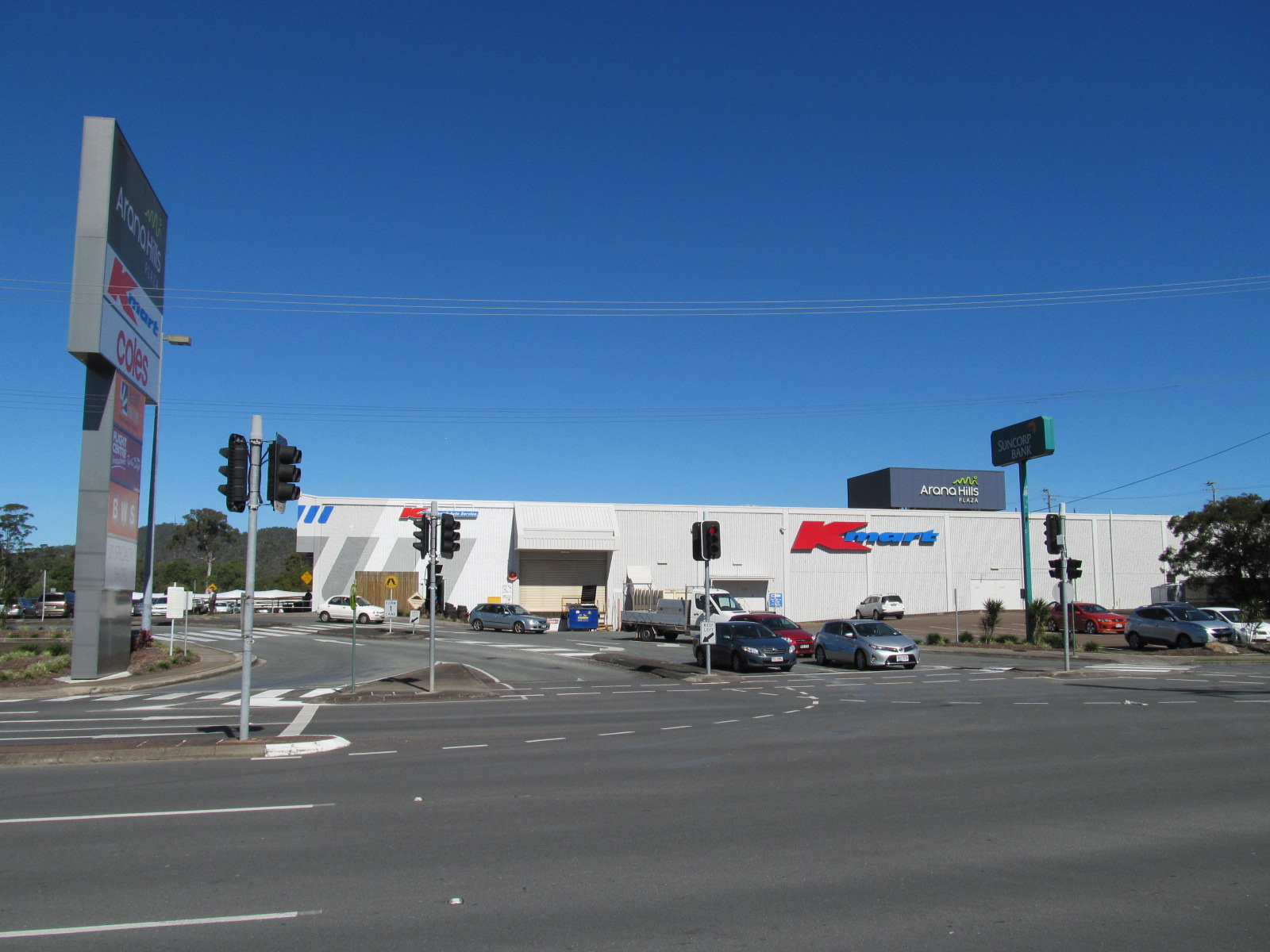 Arana Hills Plaza at Arana Hills, Queensland